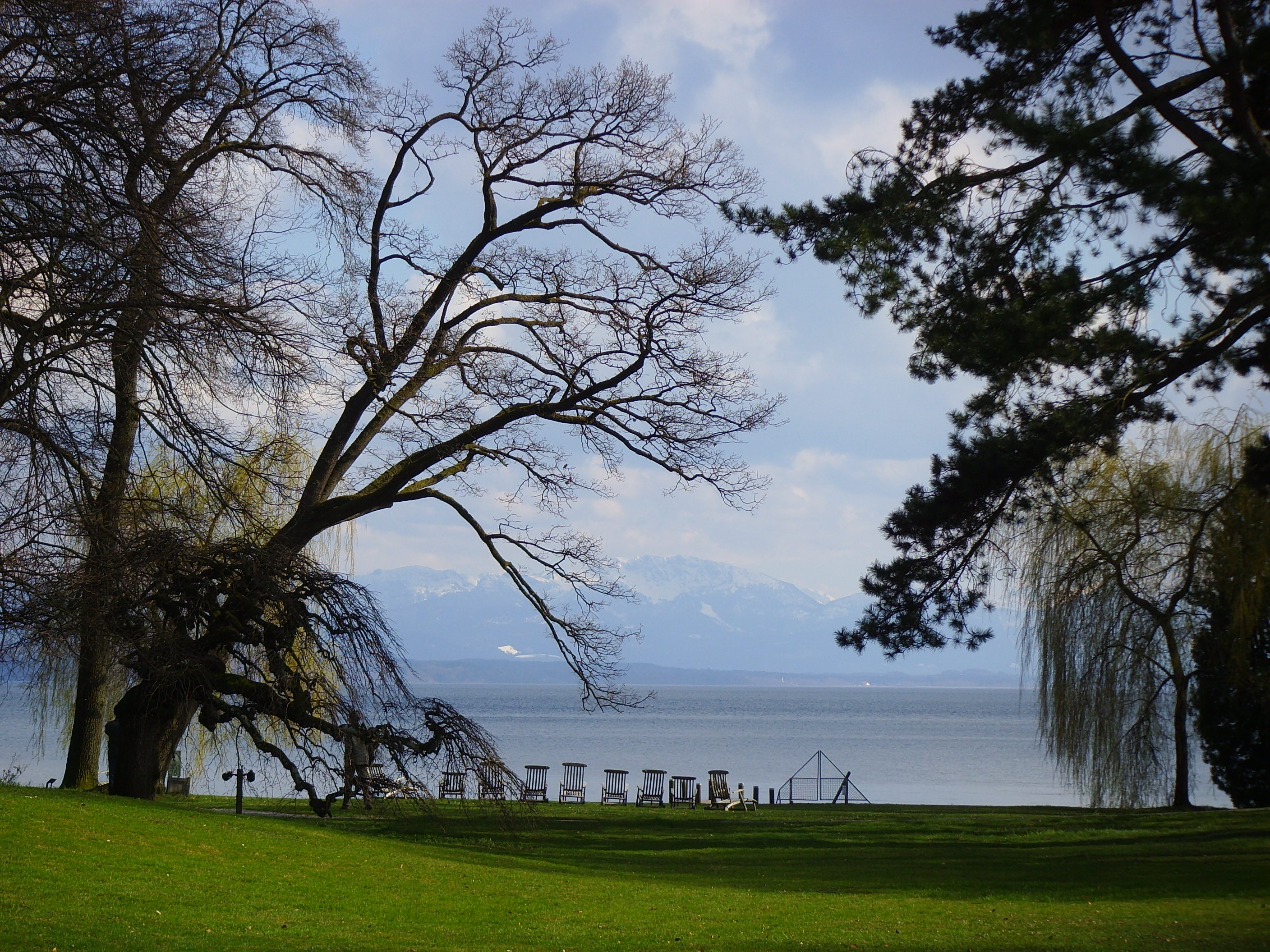 Schloss Tutzing, Sitz der Evangelischen Akademie. Schlosspark, Blick über den Starnberger See zum Karwendel Gebirge